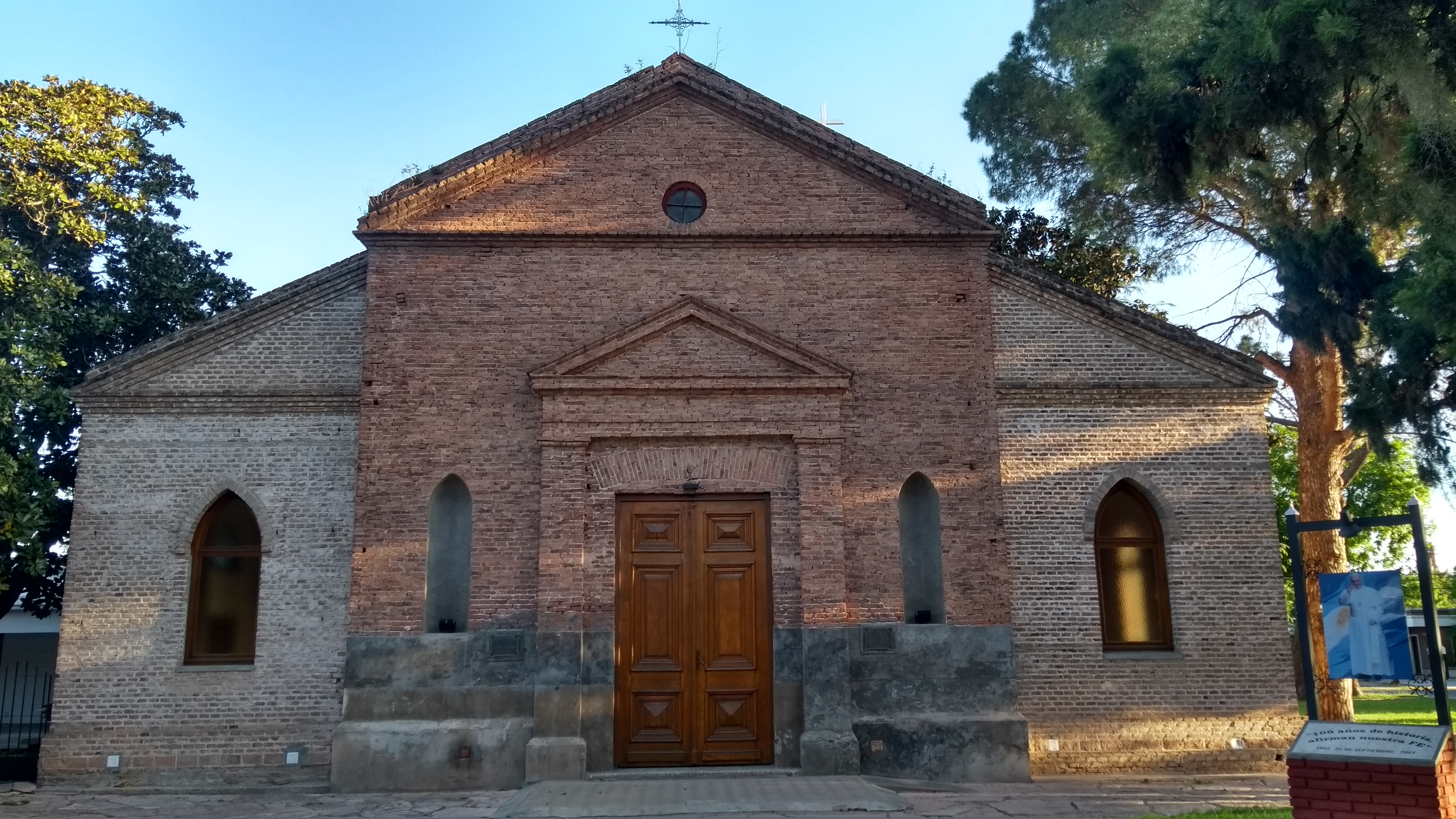 Capilla San Fermín